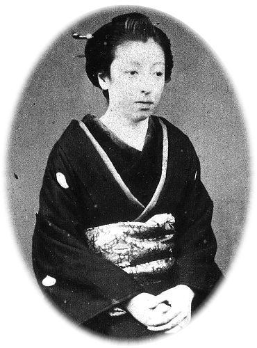 堀田吉子肖像写真